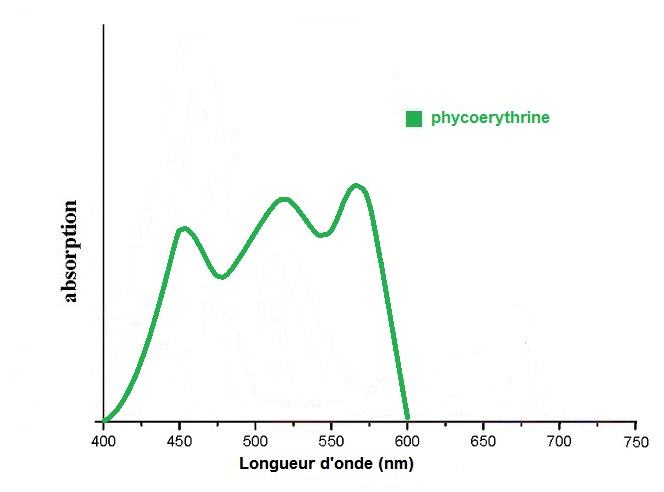 spectre d'absorption de la Phycoerythrine